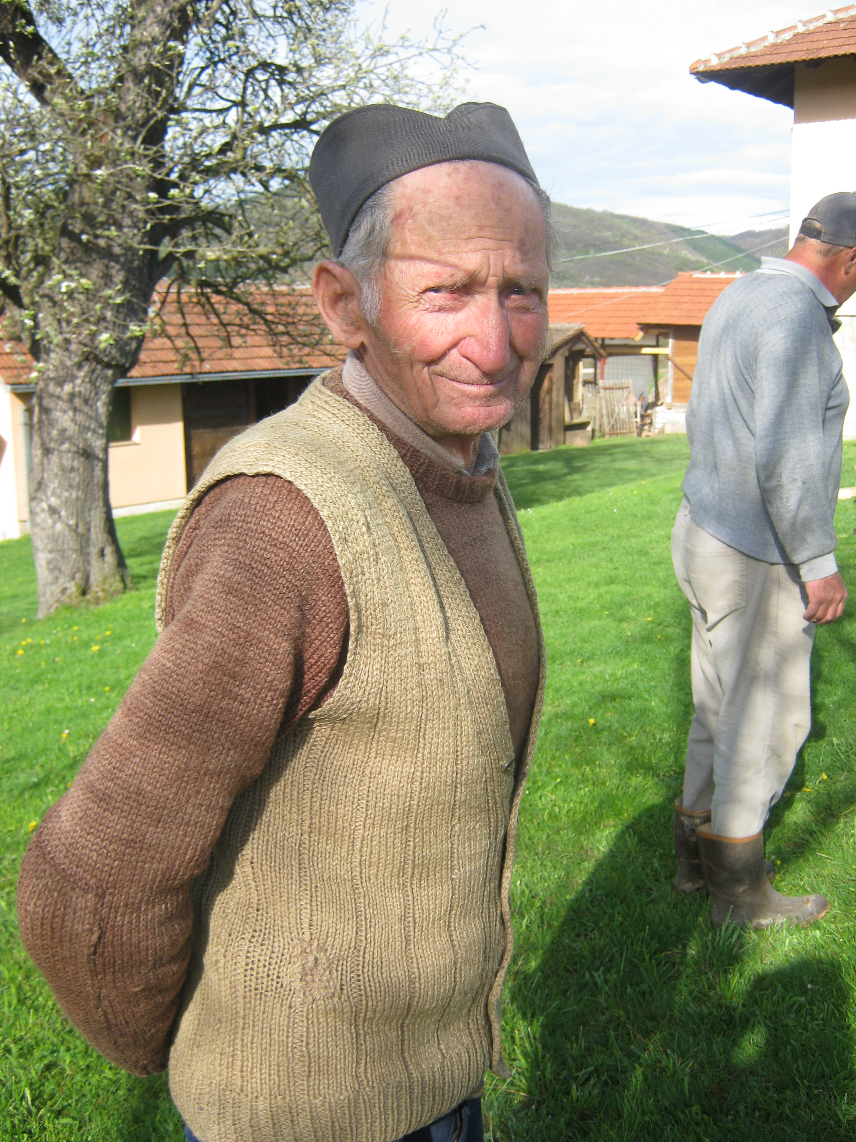 Деда Божо, први комшија и као рођени деда. Много ме је о животу научио, о добром и лошем. Имао је мудар поглед, широк осмех и џепове пуне прича.